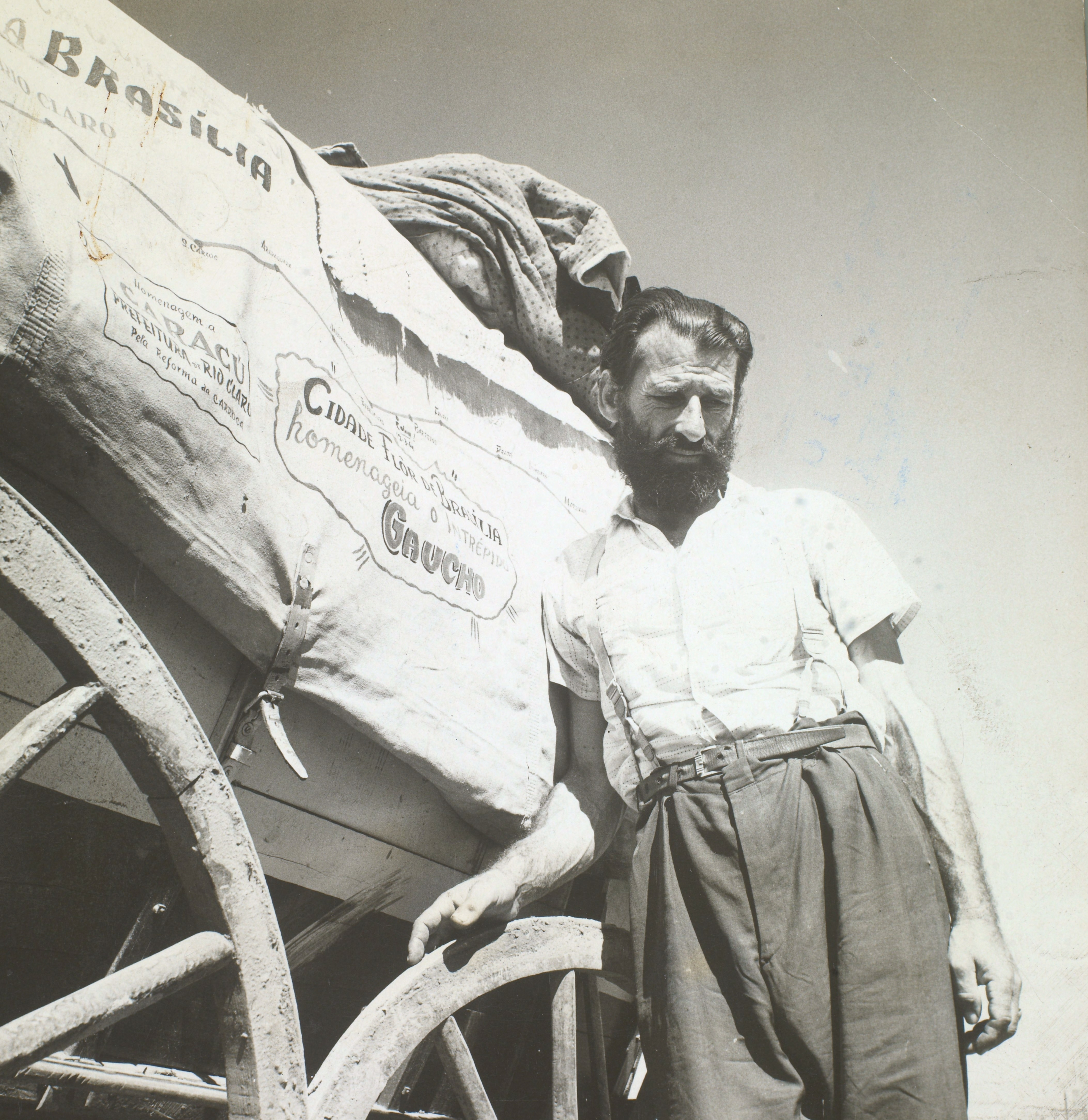 Fotografia do Fundo Correio da Manhã, sob a guarda do Arquivo Nacional.